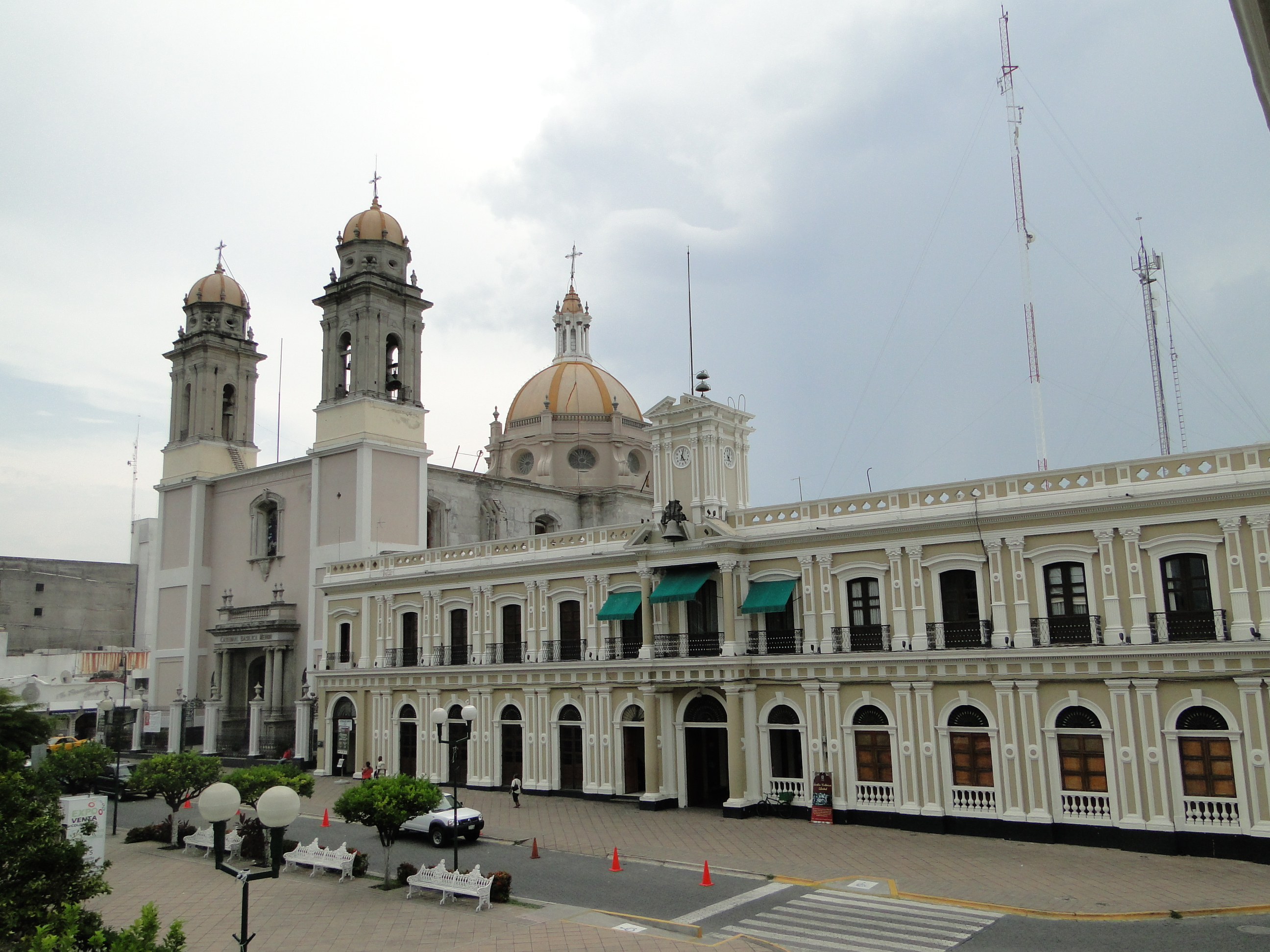 Colima, Colima